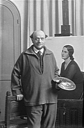 portrait du peintre Jean-Pierre Laurens (1875-1932)